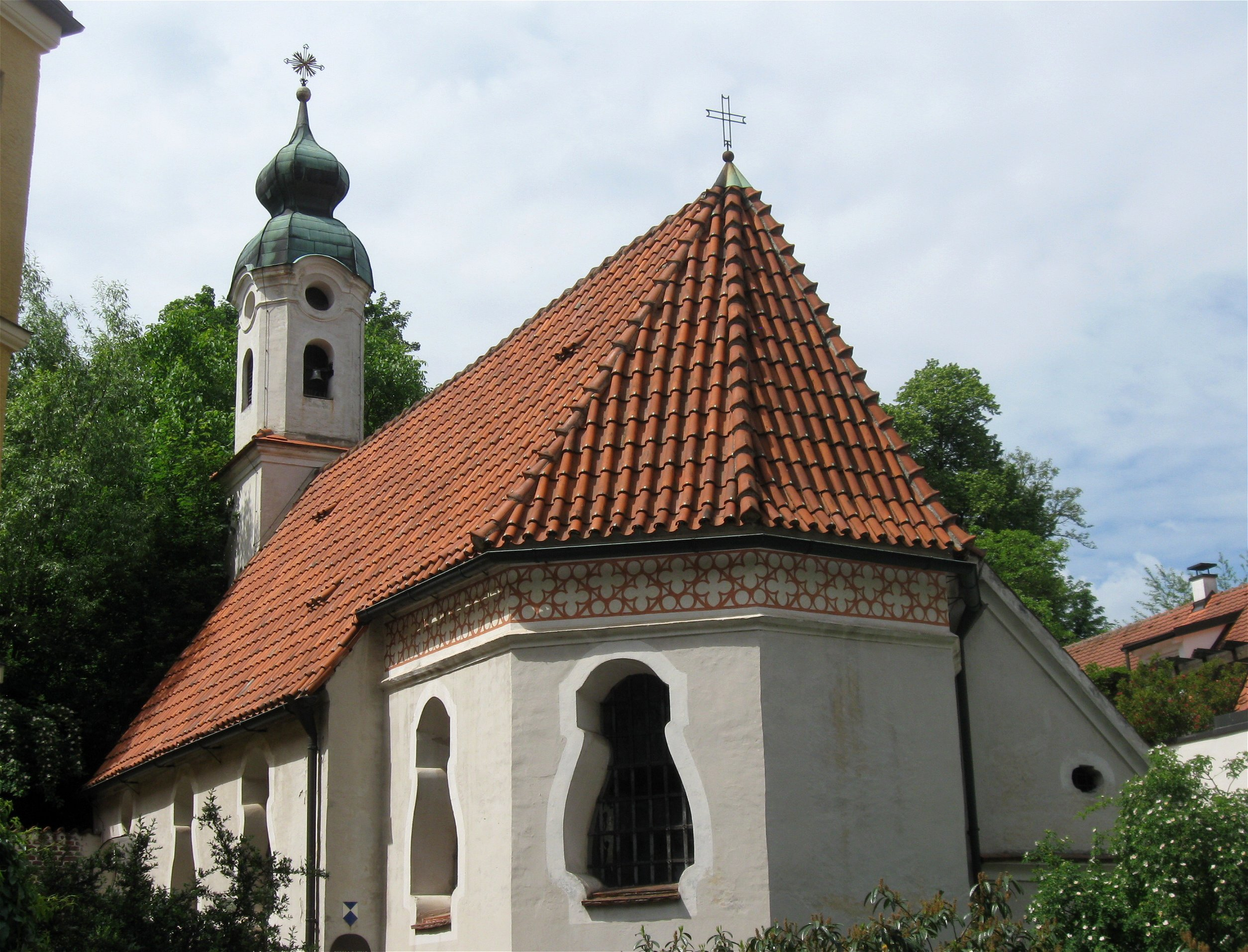 Alte Bergstraße 155; Theklakapelle, Saalbau mit eingezogenem Chor, Sakristei und Fassadenturm mit Zwiebelhaube, gestiftet 1426 von Wilhelm von Neufraunhofen, barocke Umgestaltung 1759; mit Ausstattung. D-2-61-000-33